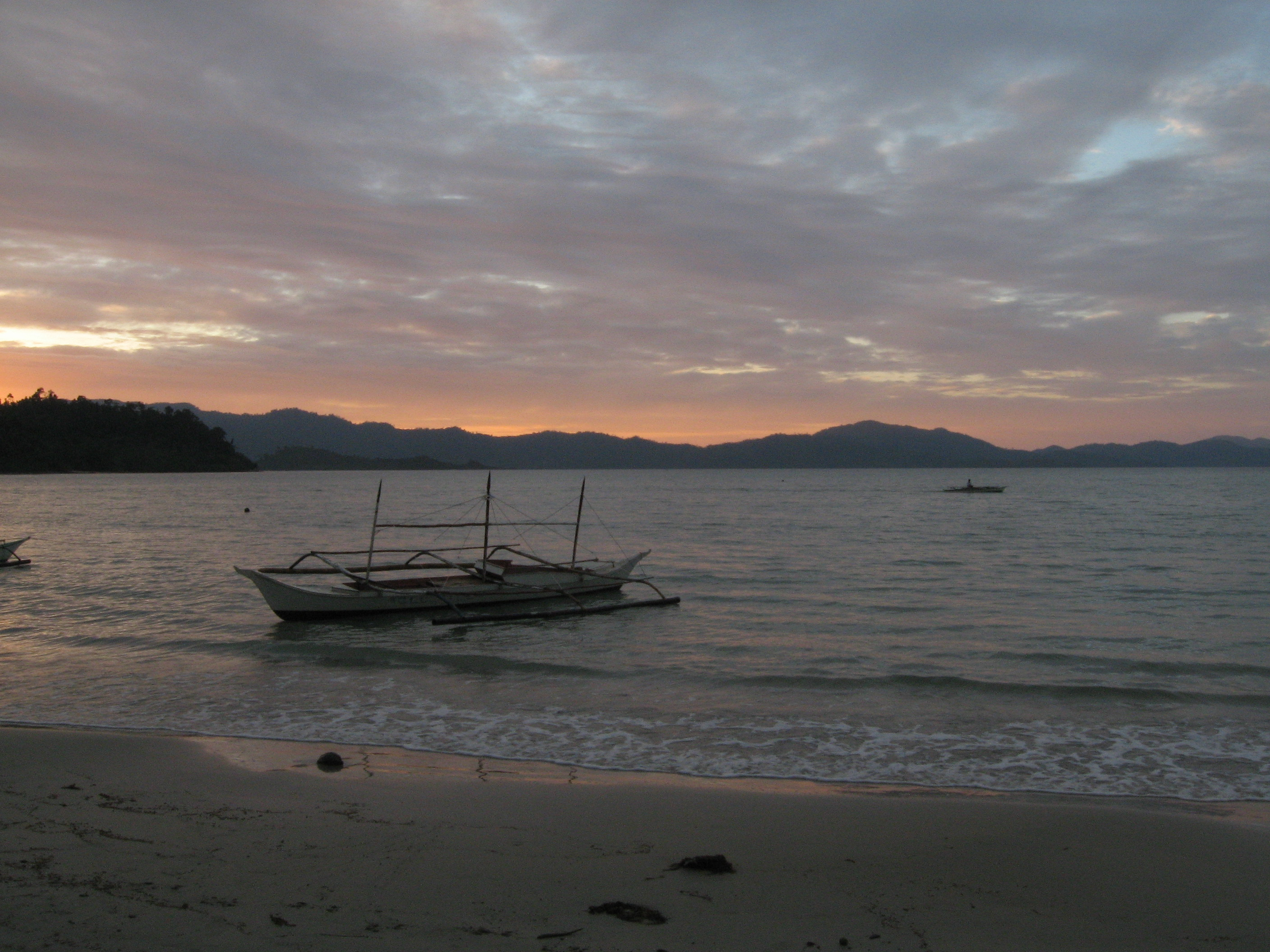 Port Barton, Palawan, Philippines